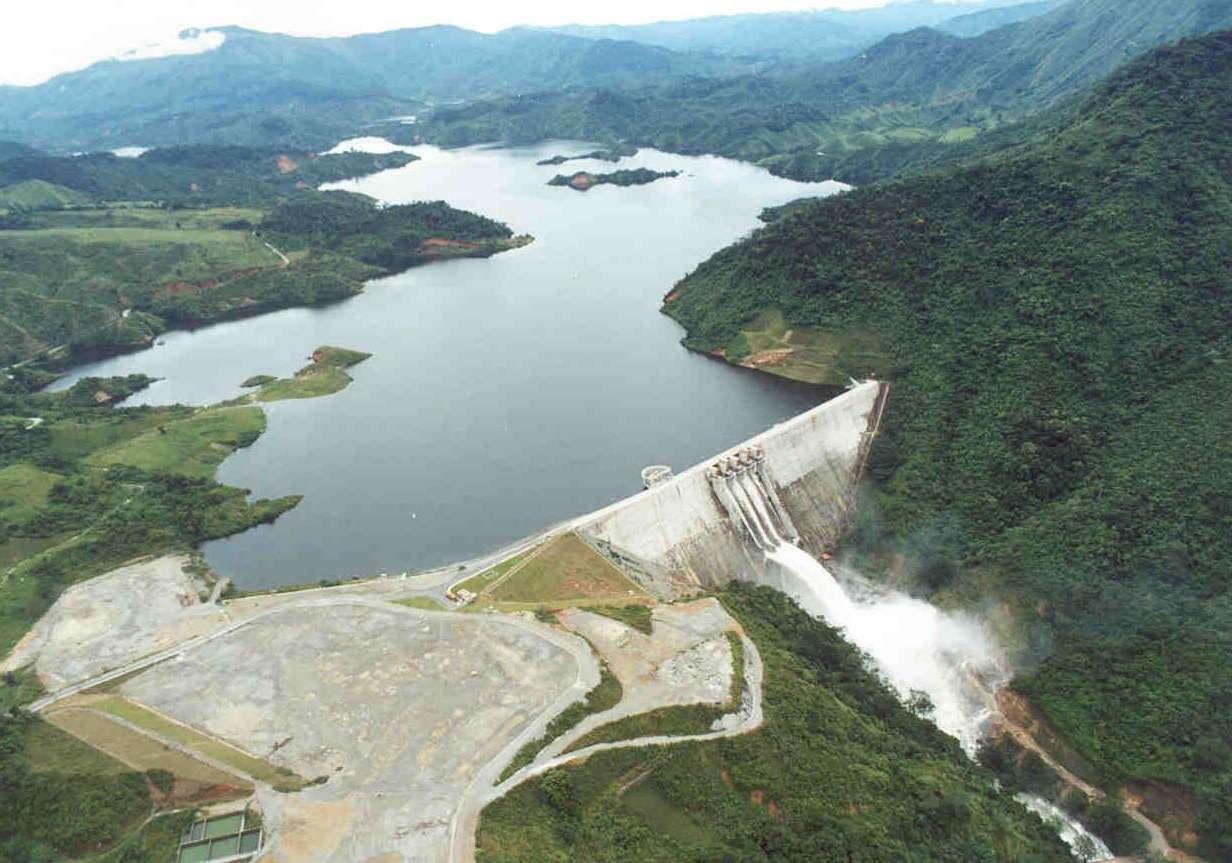 Presa en Concreto Compactado con Rodillo